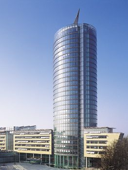 Zentrale der ERGO Versicherungsgruppe in Düsseldorf